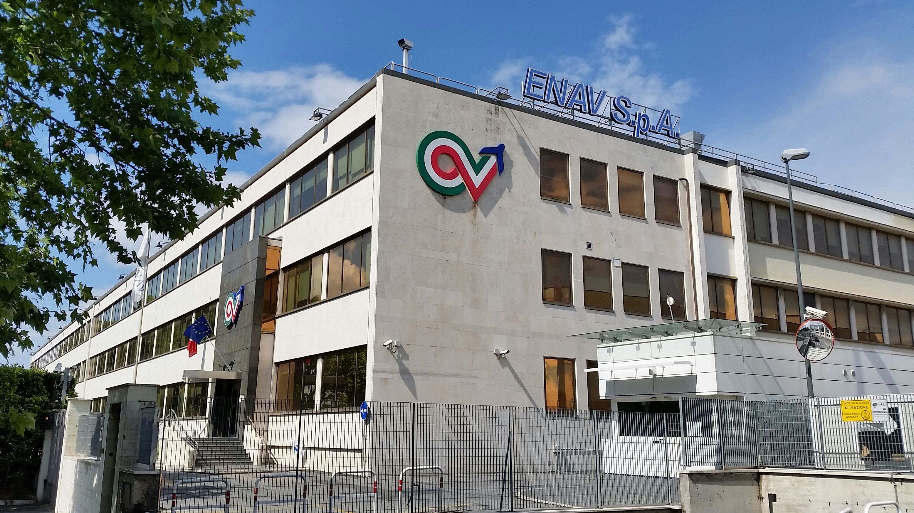 Sede principale di ENAV SpA a Roma, Via Salaria 716